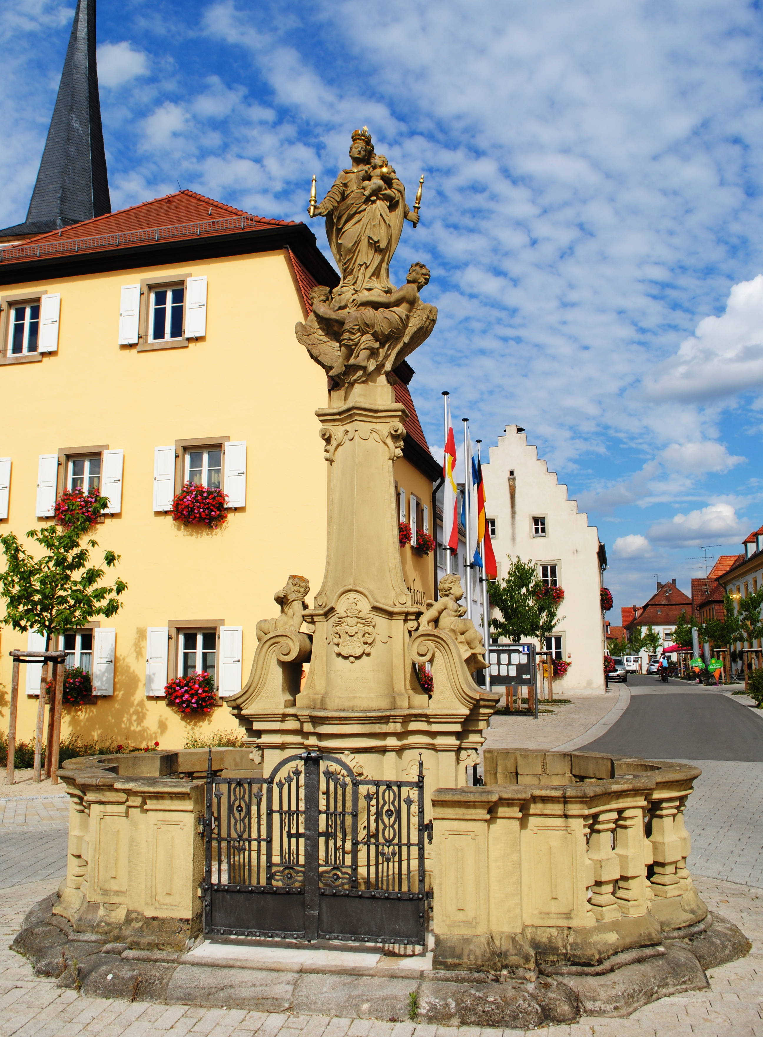 Mariensäule, Vorderseite, Marktplatz, Nordheim am Main, Sandstein, bez. 1775, Spätrokoko, erneuert 1929.